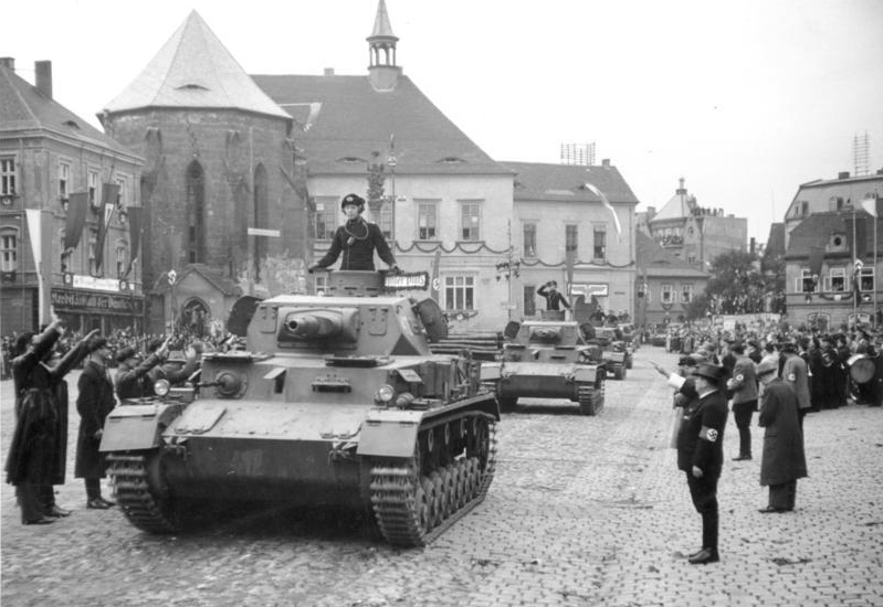 Einmarsch in das Sudetenland. Schwere Panzerkraftwagen [Panzer IV, Ausf. A] vor General Reinhardt. Heavy German tanks driving past General Reinhardt in Adolf Hitler Platz, Komotau (today, Máje1 Namestie, Chomutov - 1st May Square, Chomutov).